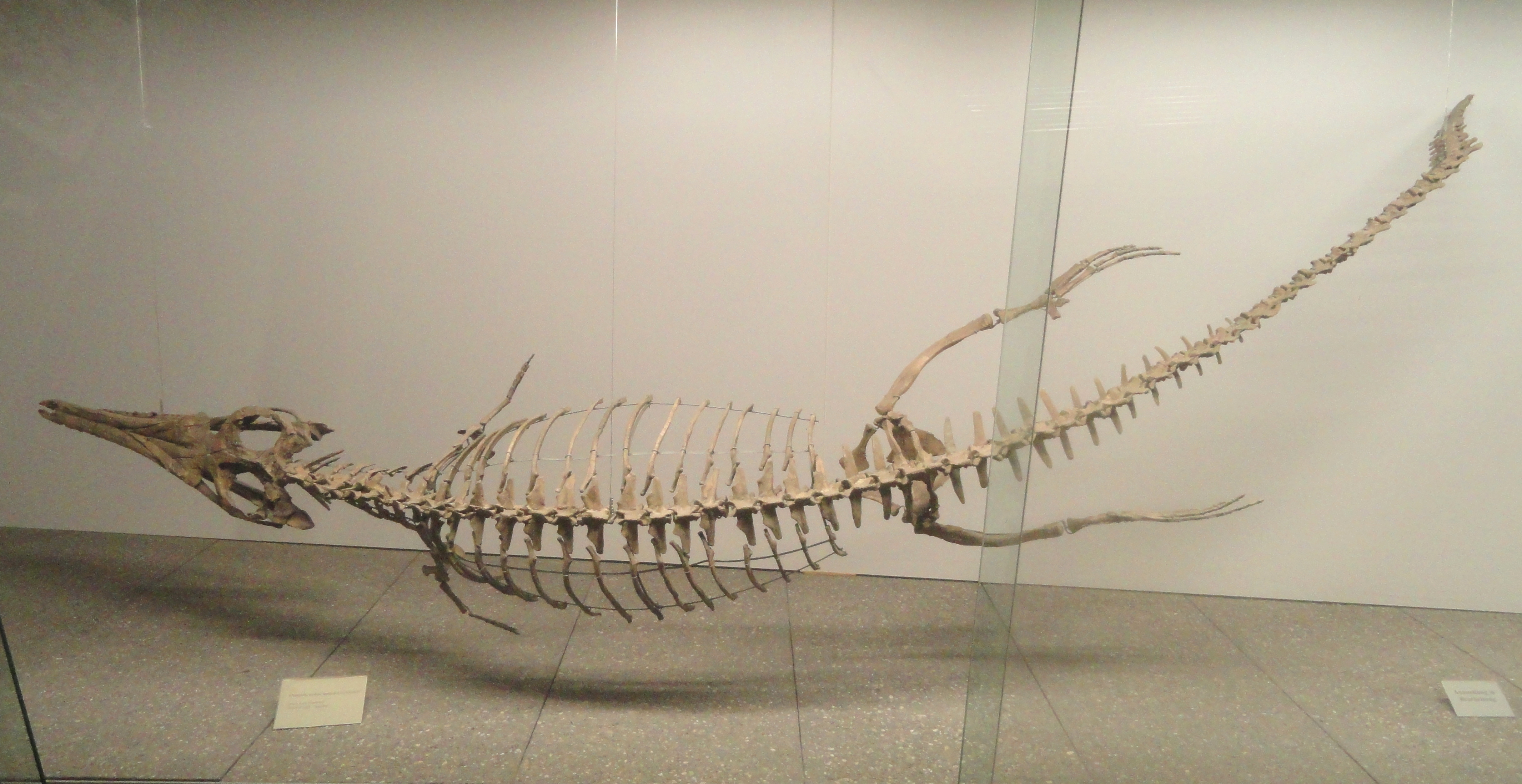 Exhibit in Naturmuseum Senckenberg, Frankfurt am Main, Germany.